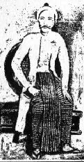 မြန်မာဘာသာ: မောင်ဇေယျာ ၏ စာပေသမိုင်း ပုဂ္ဂိုလ်ရေး အတွေးအမြင်များ စာအုပ်မှ ကူးယူဖော်ပြသည်။